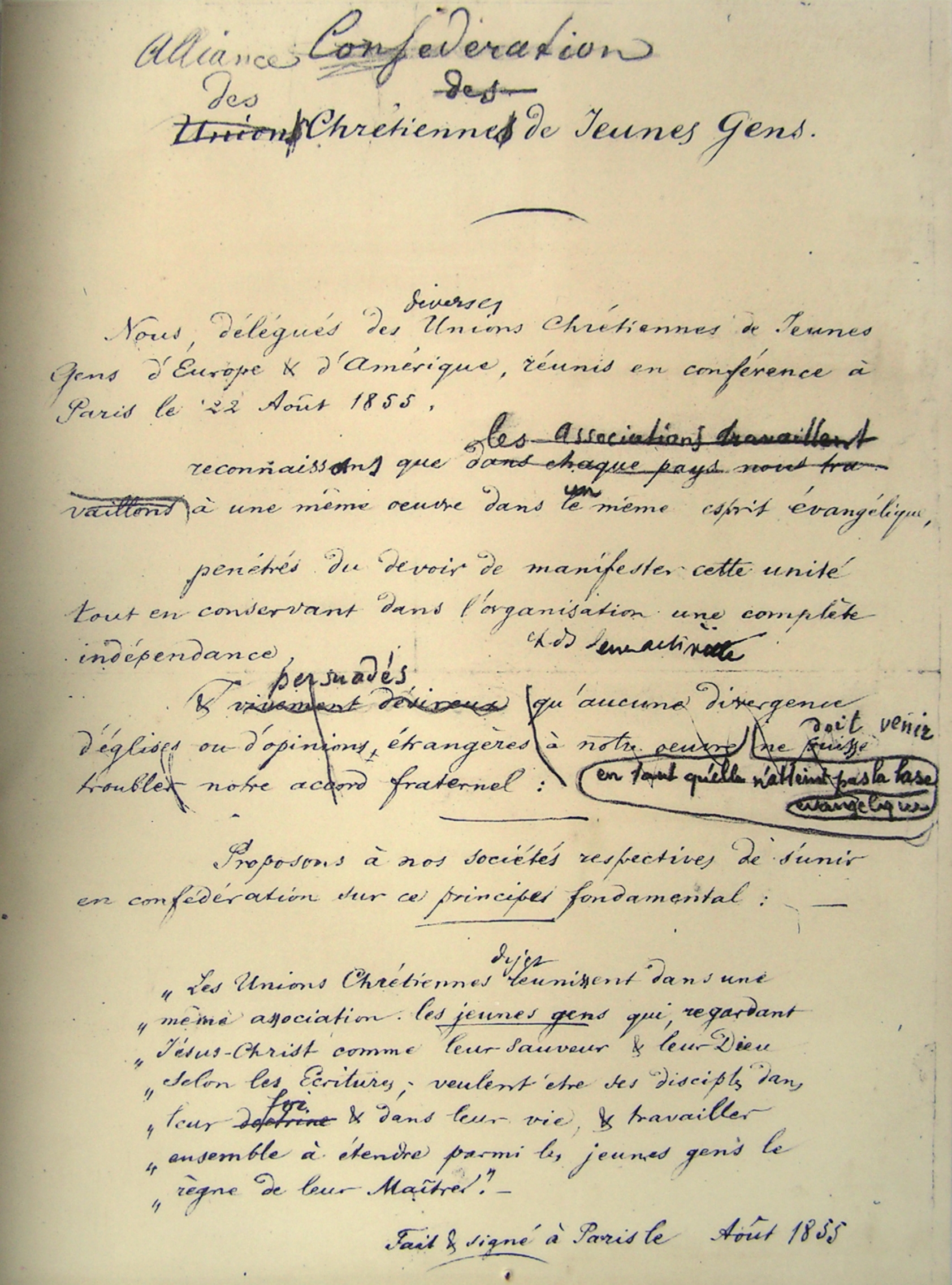 Chemin du Clos de Belmont, Genève. Archives de la Young Men's Christian Association (YMCA). Reproduction des statuts de 1855.